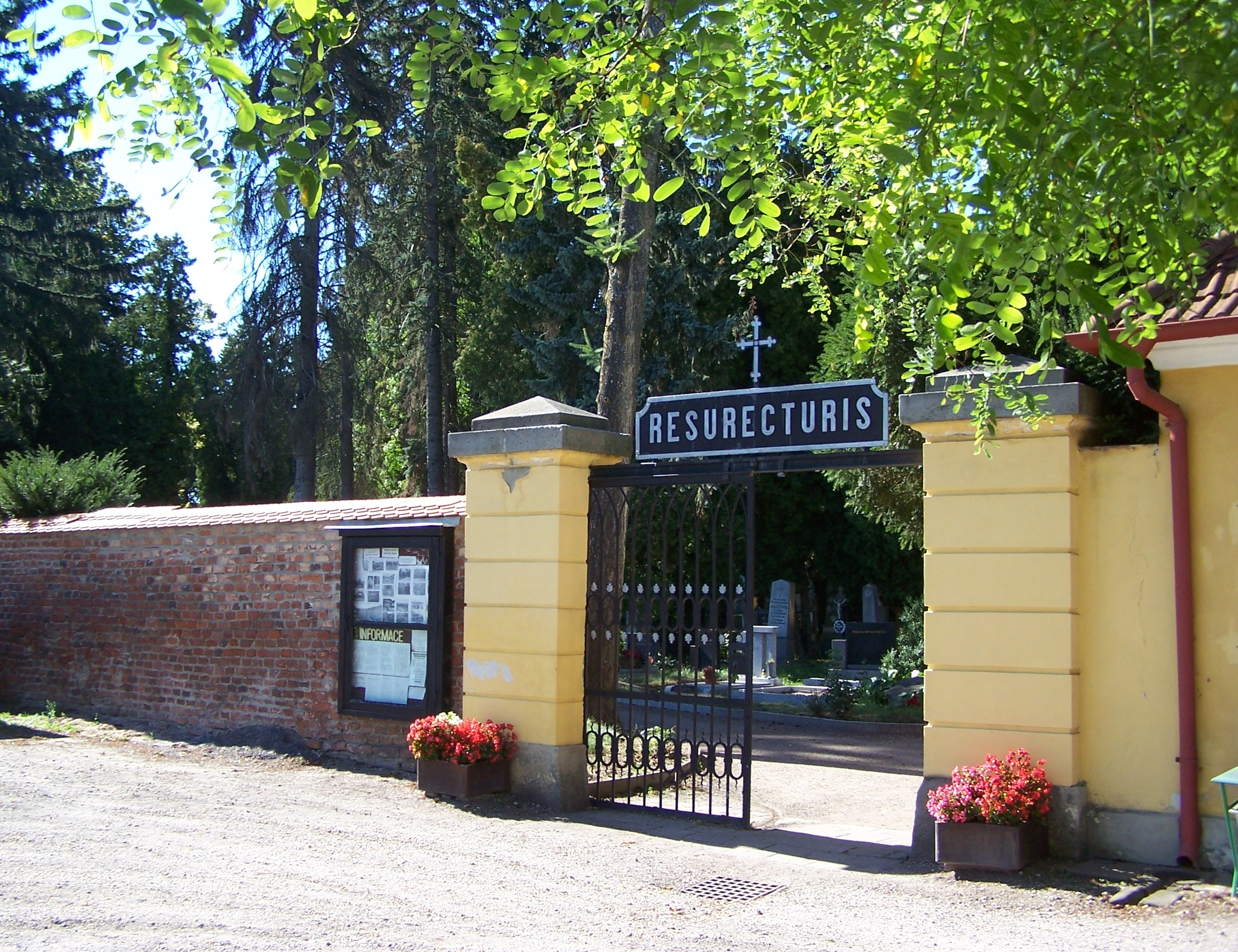 Starý vojenský hřbitov (Rasošky), Rasošky